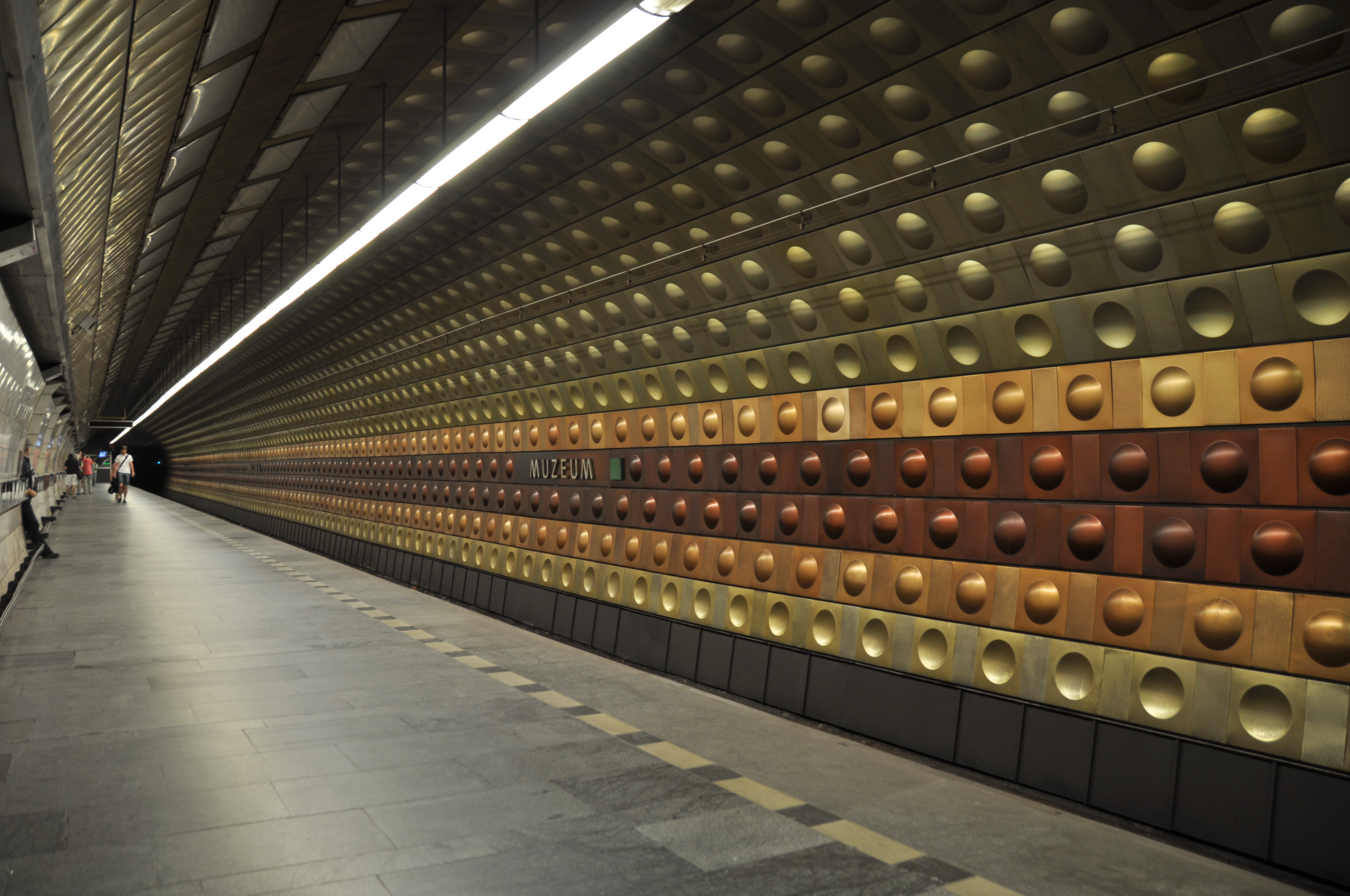 Metro Praha